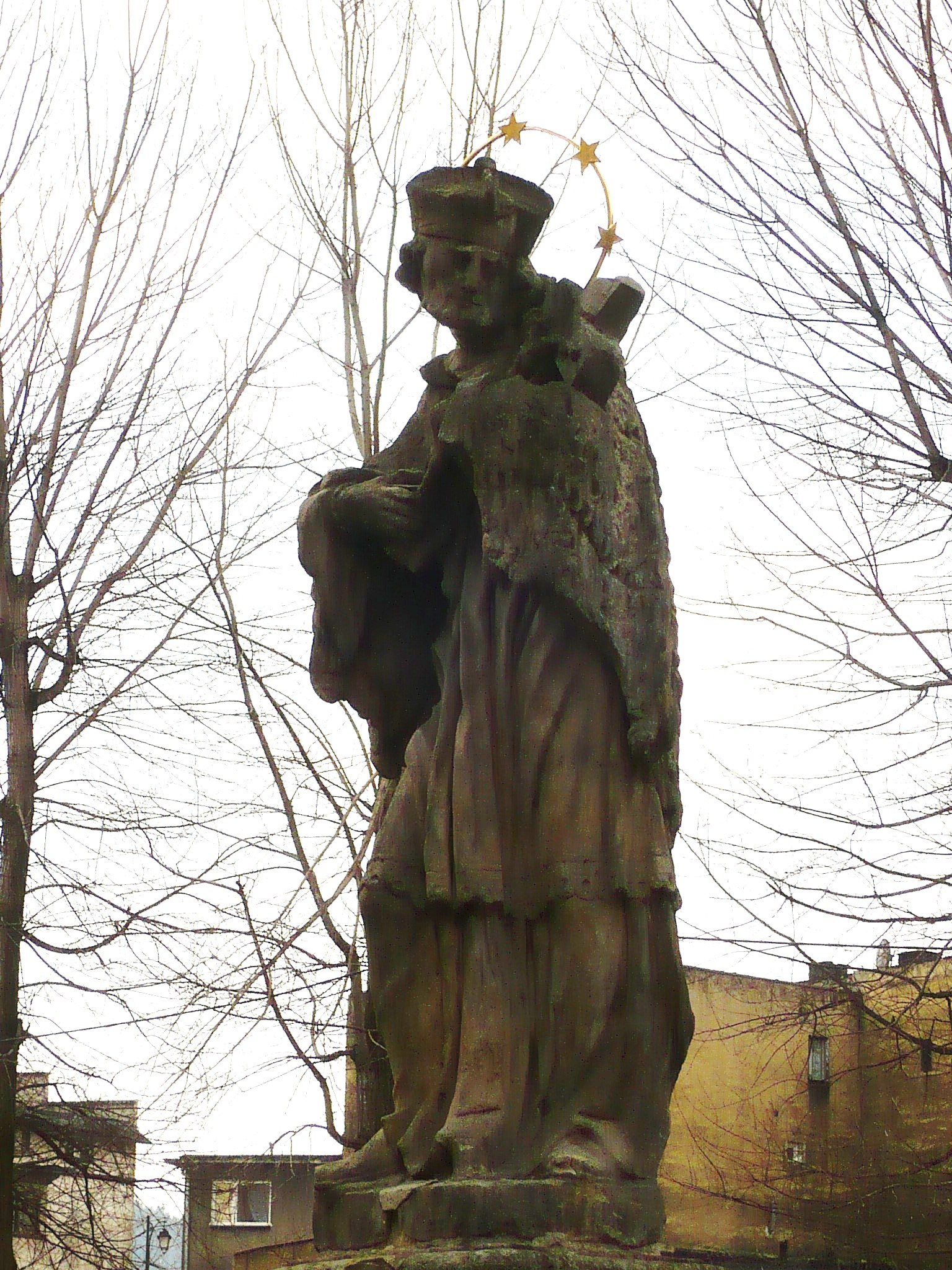 Johannes-Nepomuk-Statue in der Schuhmacherstrasse (ul. Piastów ) in Neurode (Nowa Ruda), ehemalige Grafschaft Glatz, Niederschlesien, Polen.